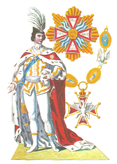 Prent van een Ridder in de Orde van de Witte Adelaar in de ordekleding.